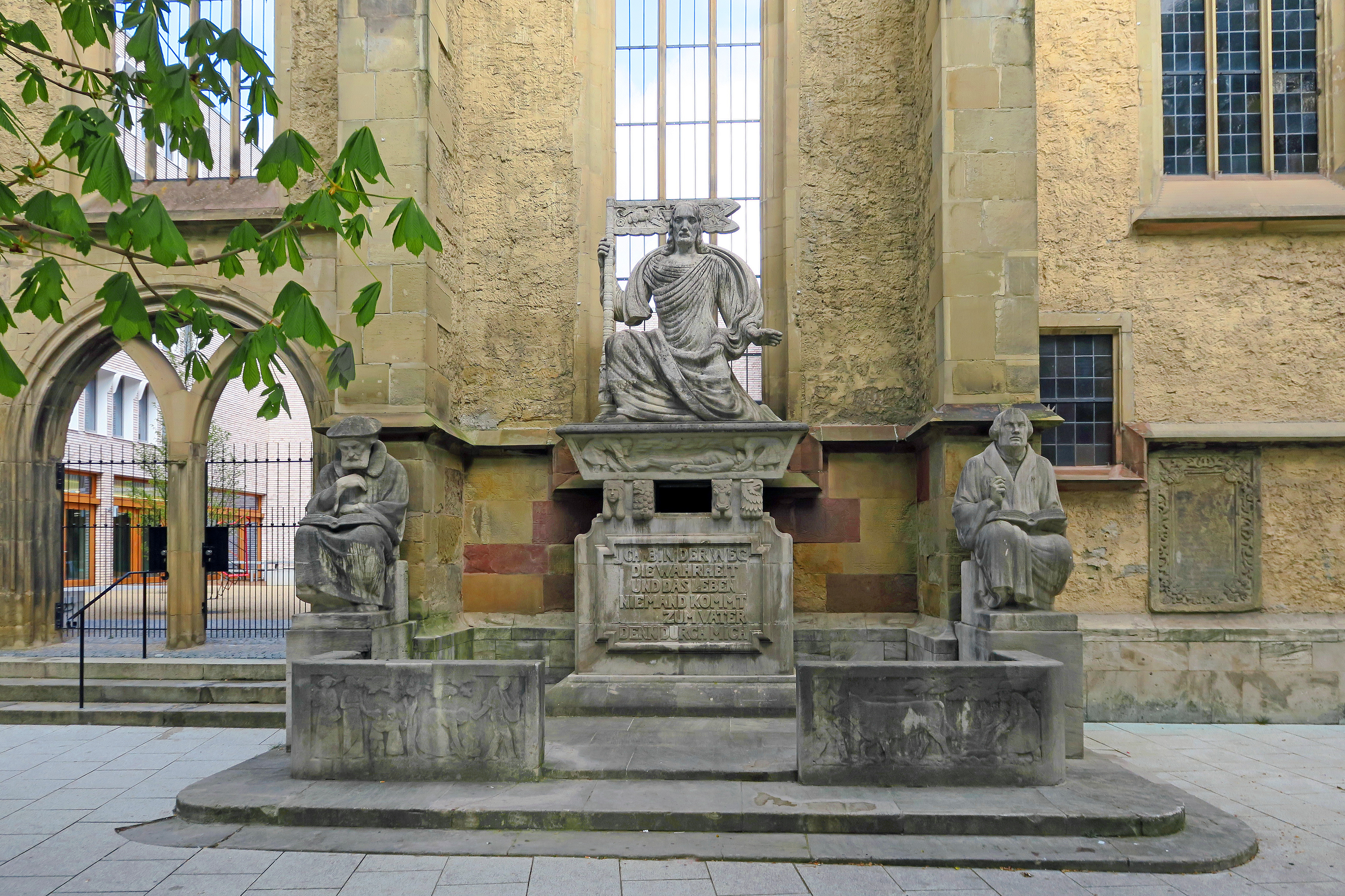 Teil der ehemaligen Südfassade der Hospitalkirche in Stuttgart mit dem Reformationsdenkmal.